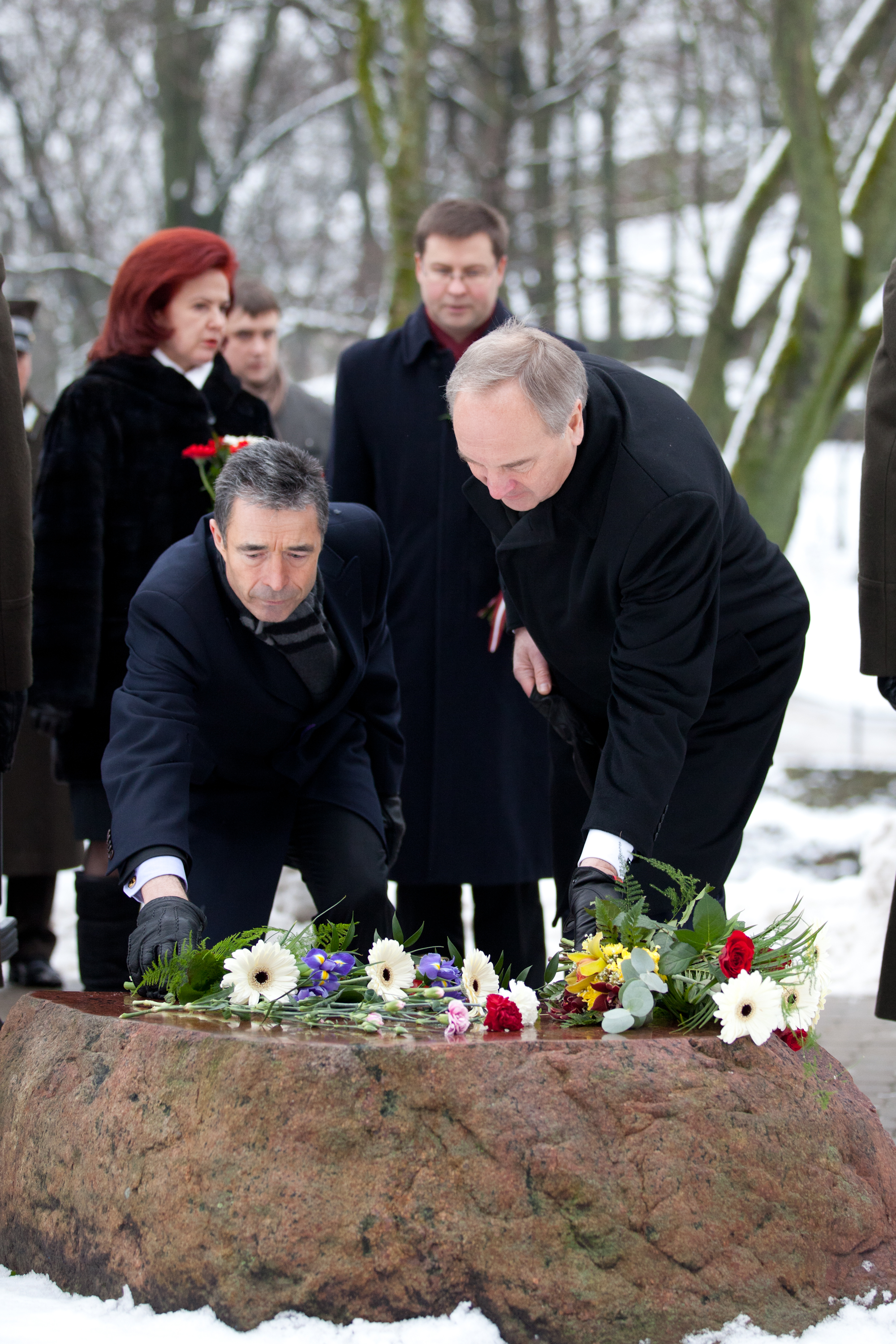 Foto: Toms Norde, Valsts kanceleja